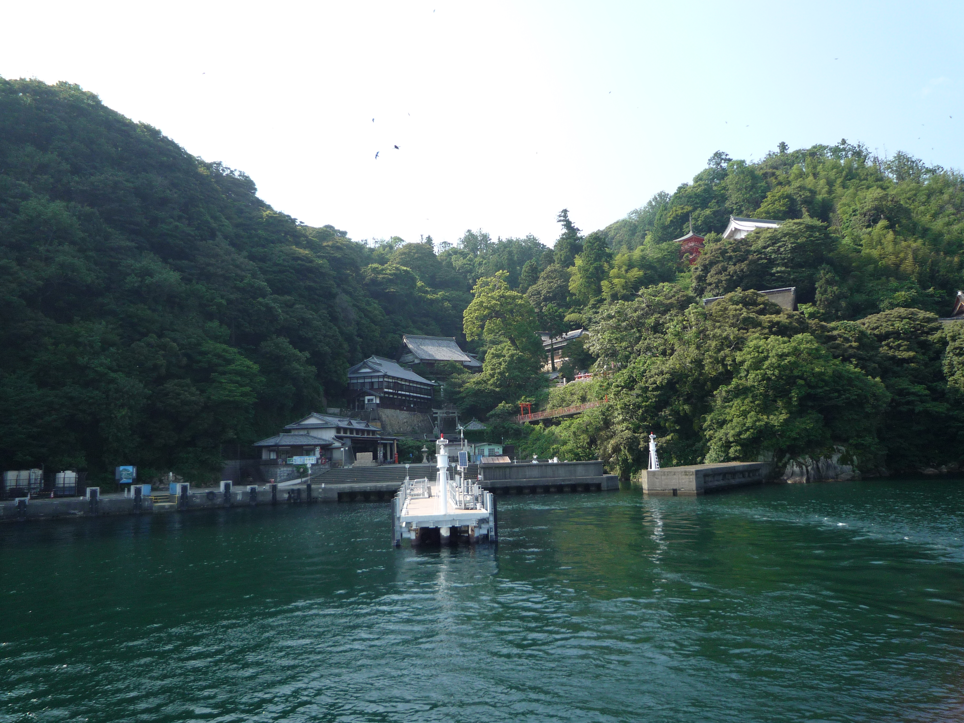 竹生島漁港